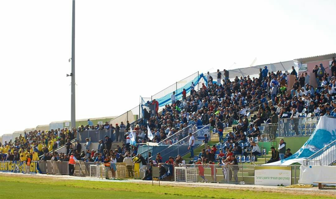 אצטדיון דימונה בזמן משחק ליגה.